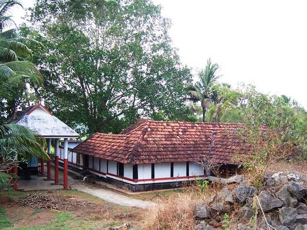 അടാട്ട് ശിവക്ഷേത്രം, തൃശ്ശൂർ